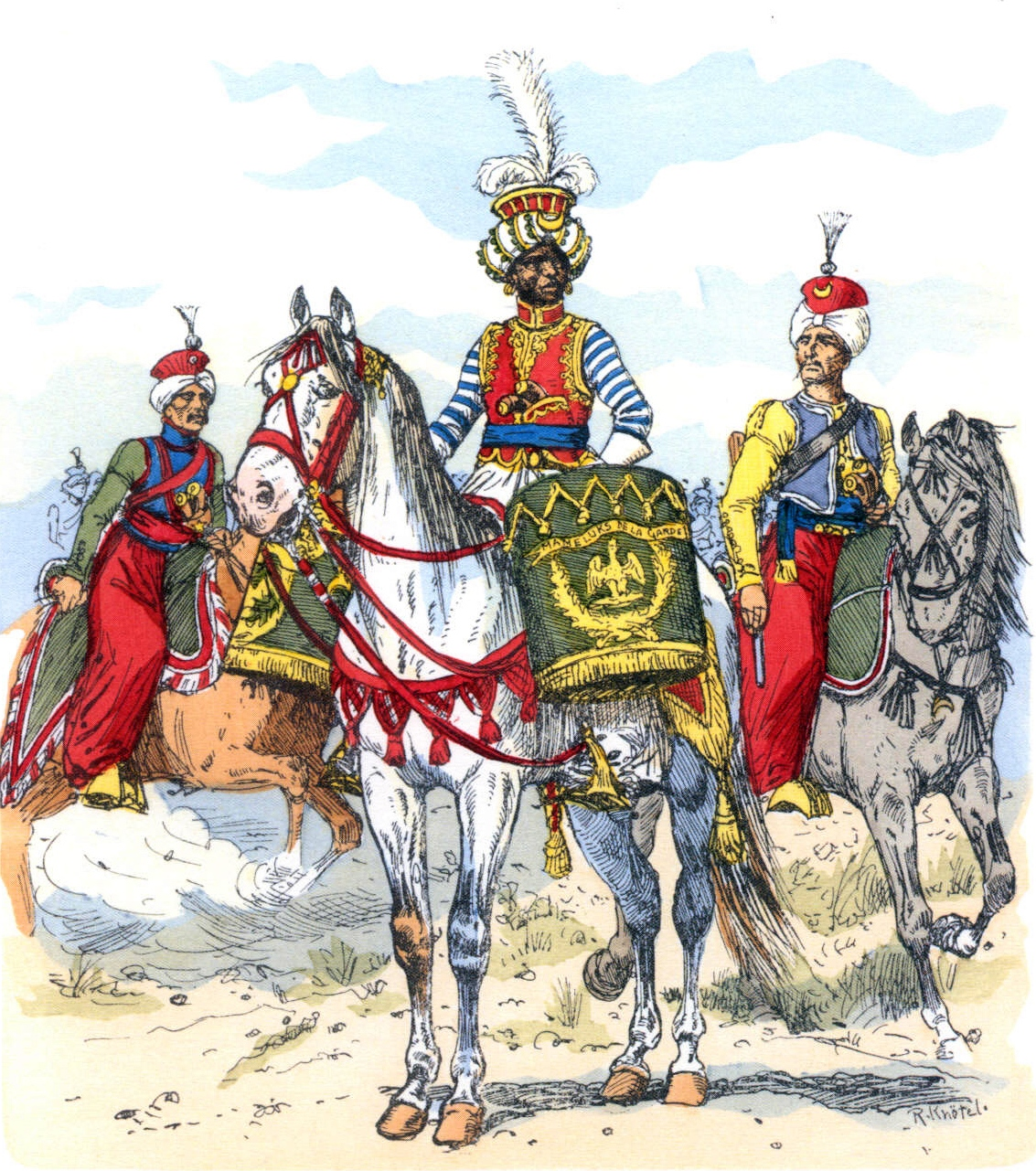 Timbalier et mamelouks de la Garde impériale en grande tenue, 1808.